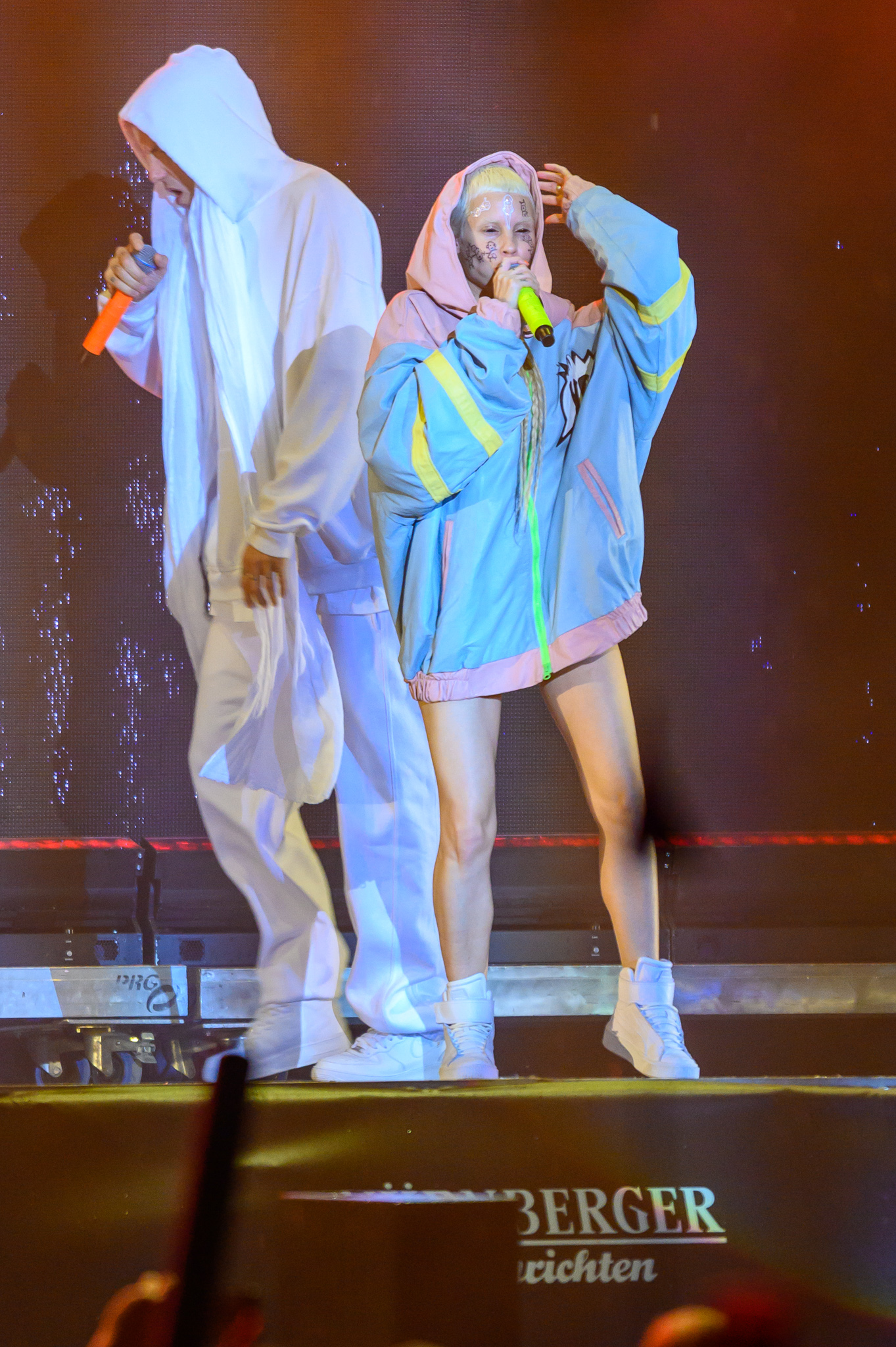 ARGO-Konzerte,Anri du Toit,Beck's Park Stage,Die Antwoord,Konzert,Livekonzert,Livemusik,Musik,Ninja,RiP,Rock im Park 2019,Watkin Tudor Jones,Yolandi Visser